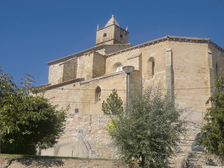 Iglesia parroquial de La Ginebrosa en honor a San Bartolomé